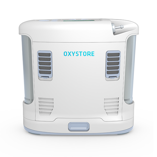 Concentratore di ossigeno portatile di ultima generazione: prodotto dalla azienda americana Inogen pesa solo 2,2 kg ed è in grado di erogare un flusso massimo di ossigeno equivalente a 4 litri al minuto.